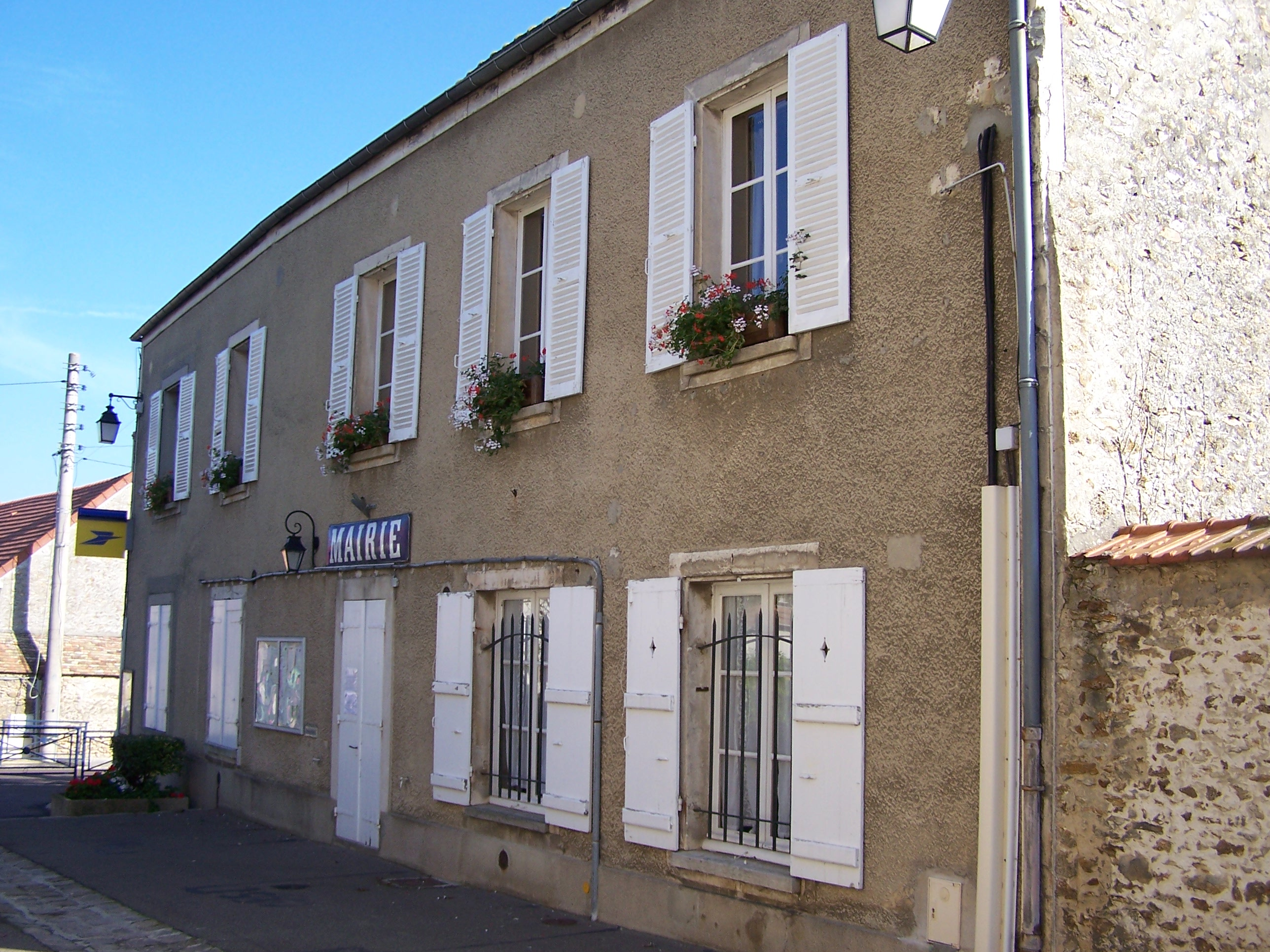 Mairie de Galluis (Yvelines, France)